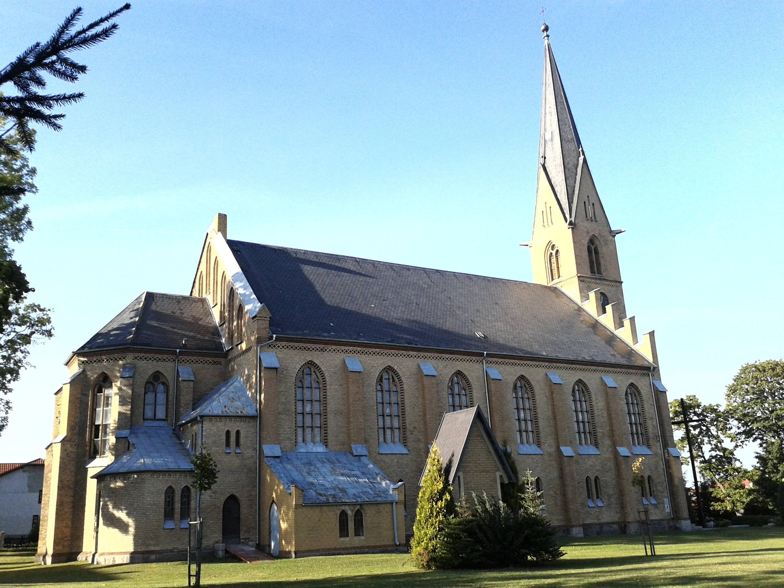 Rozogi, kościół ewangelicki, ob. rzym.-kat. par. pw. św. Marii Magdaleny, 1885